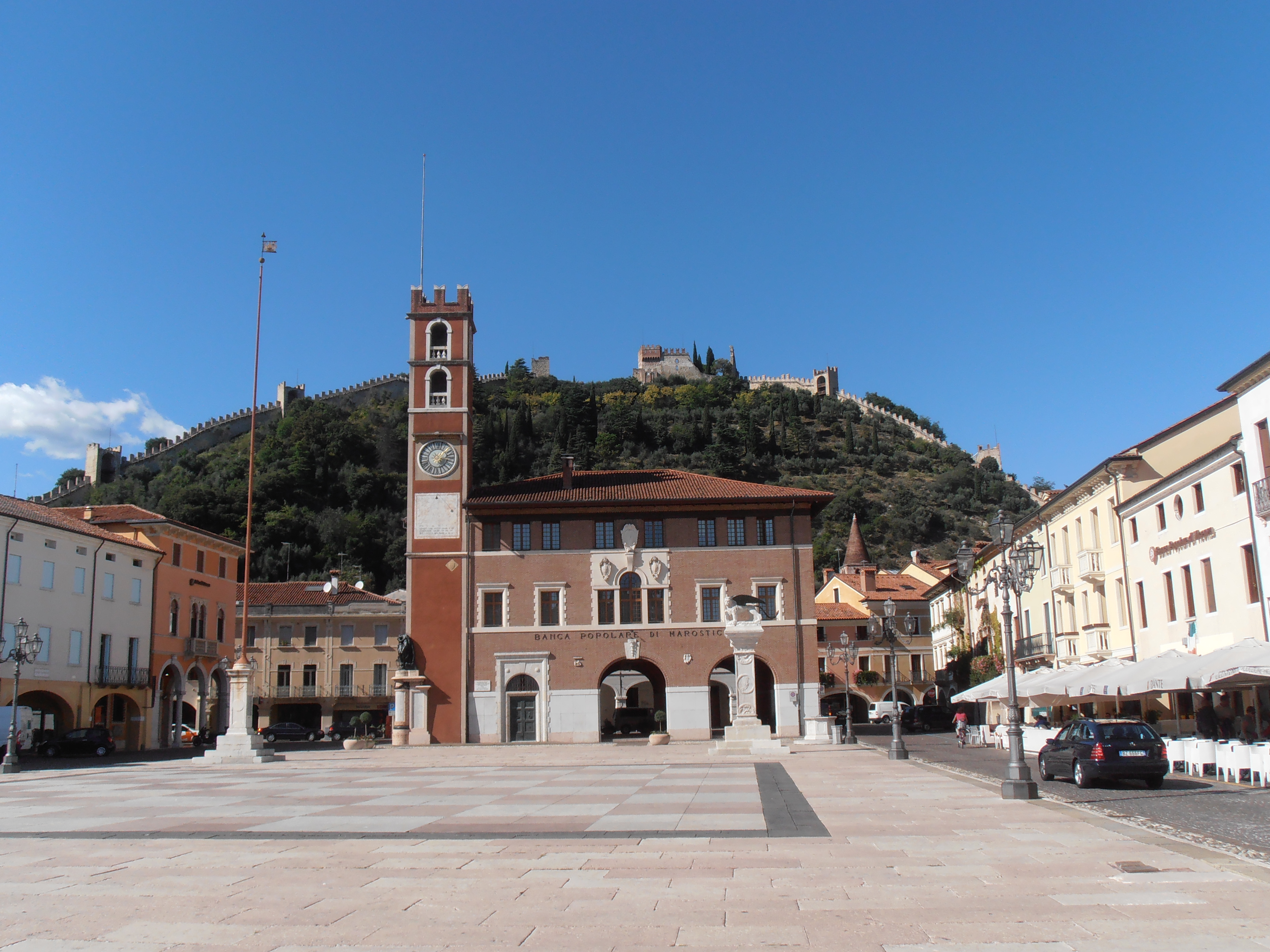 Marostica (Italie), piazza Castello et château supérieur